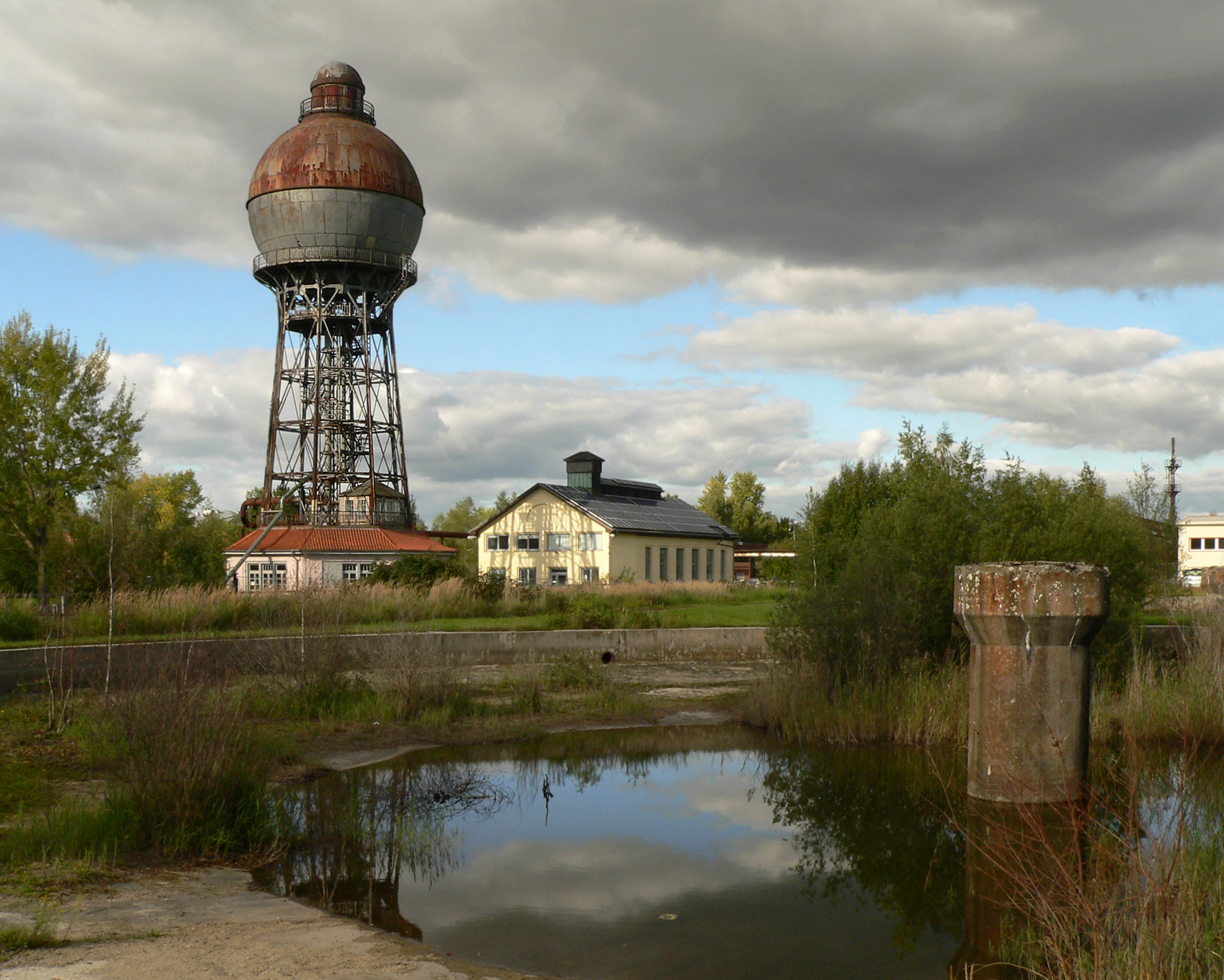 Denkmalgeschützter Kugelwasserturm von 1921 und die frühere Umformerstation der Ilseder Hütte